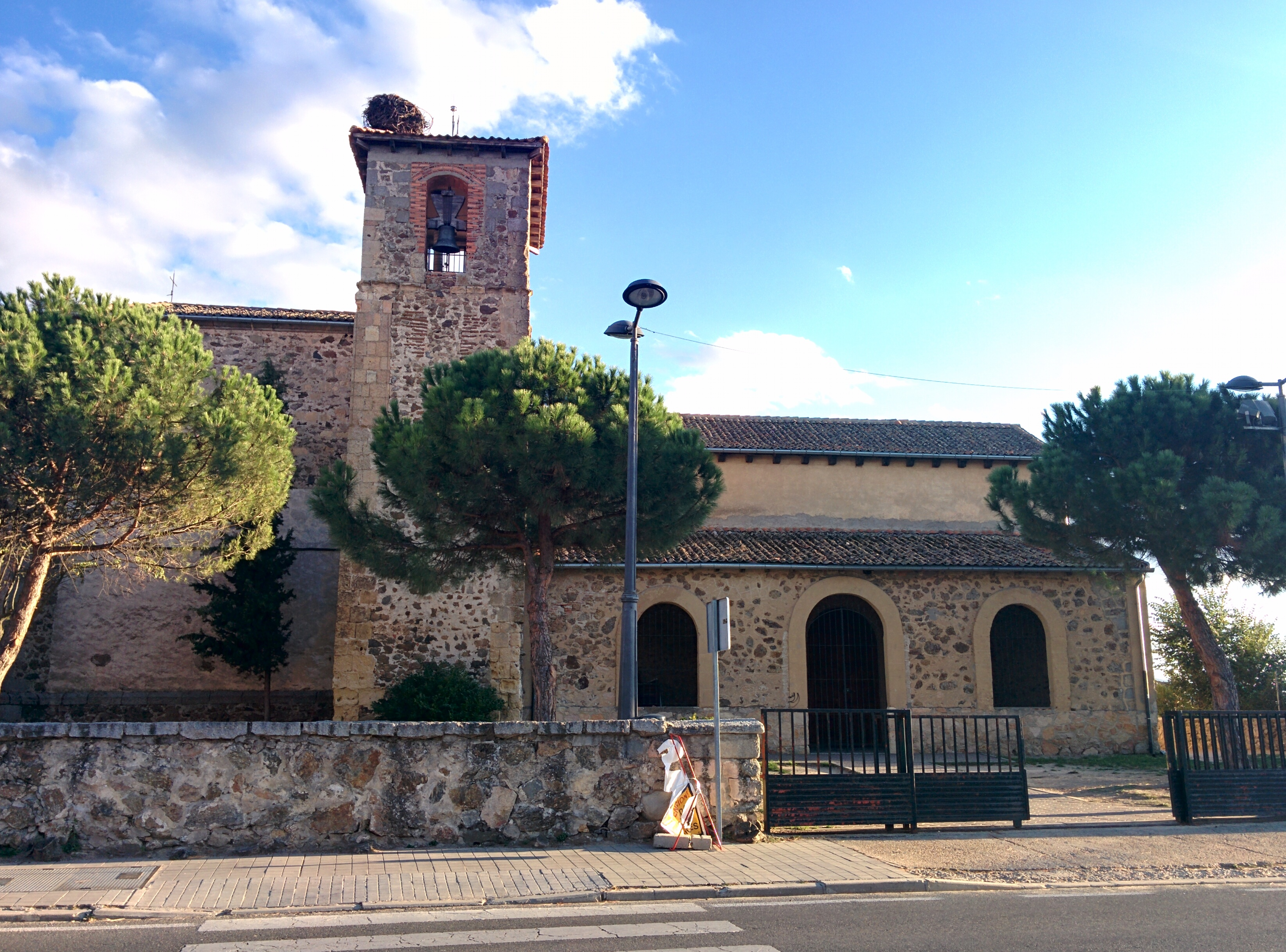 Iglesia de la Asunción, Palazuelos de Eresma (Segovia, España).